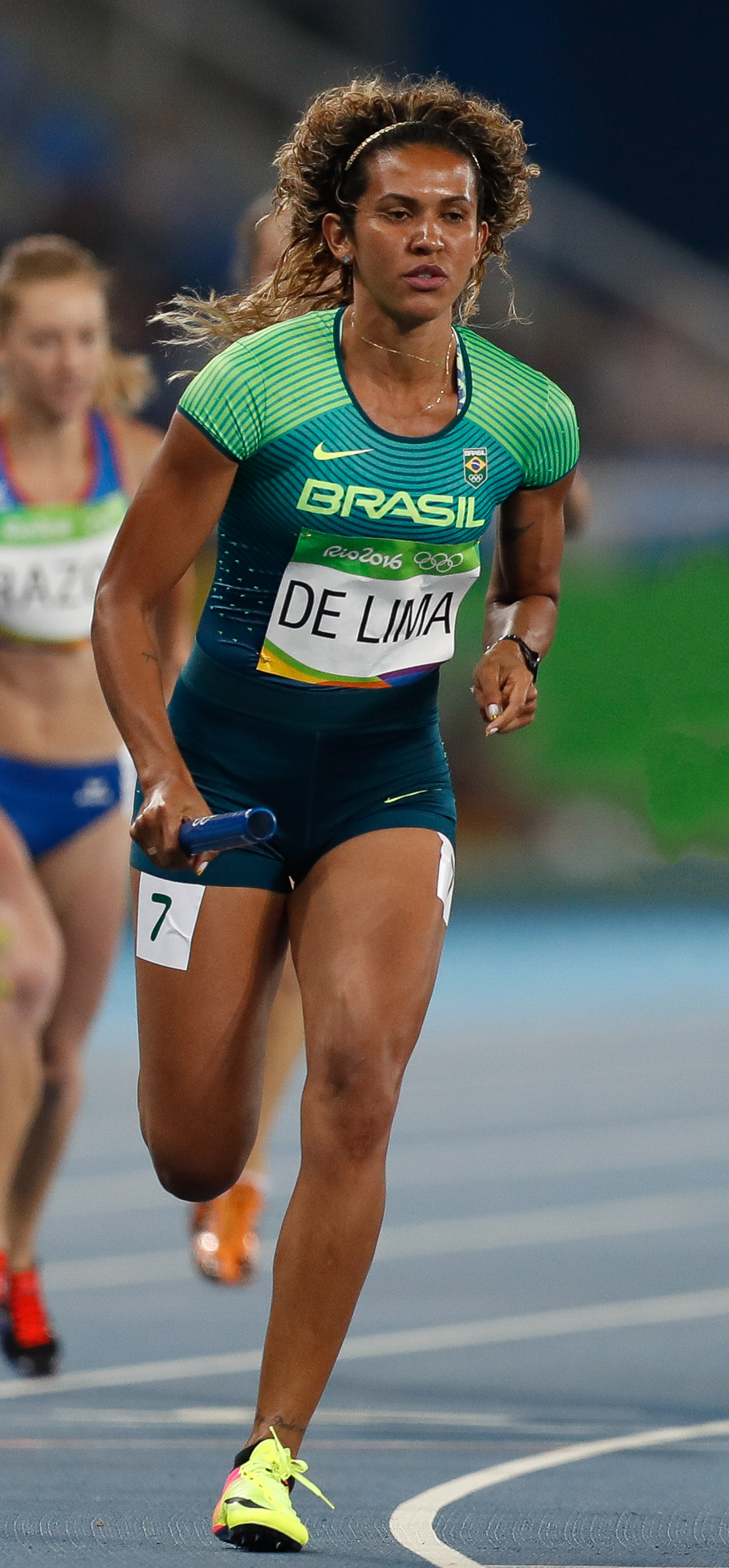 Rio de Janeiro - Eliminatórias do revezamento 4 x 400m nos Jogos Rio 2016, no Estádio Olímpico (Fernando Frazão/Agência Brasil)